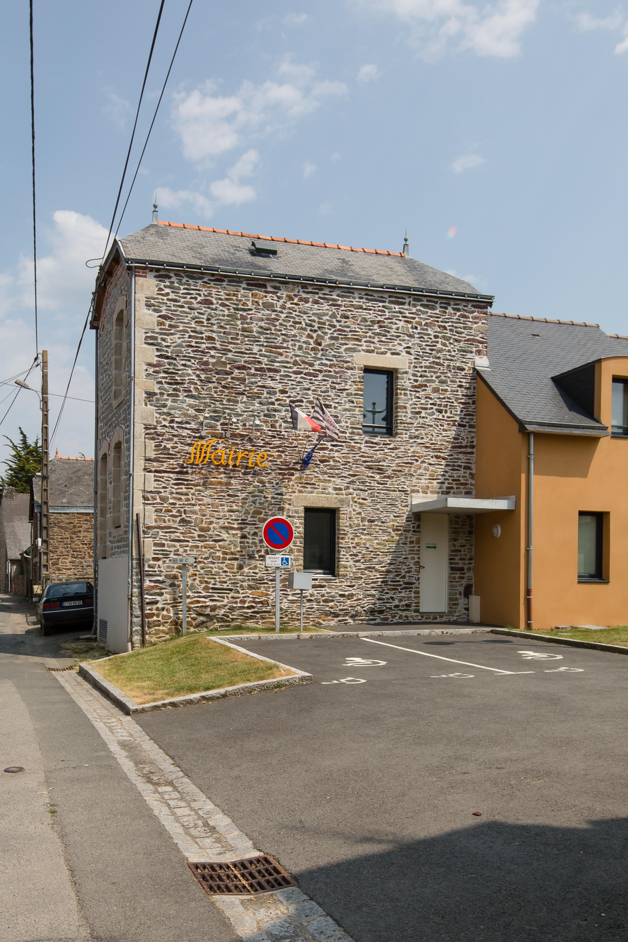 Mairie de Néant-sur-Yvel (France).